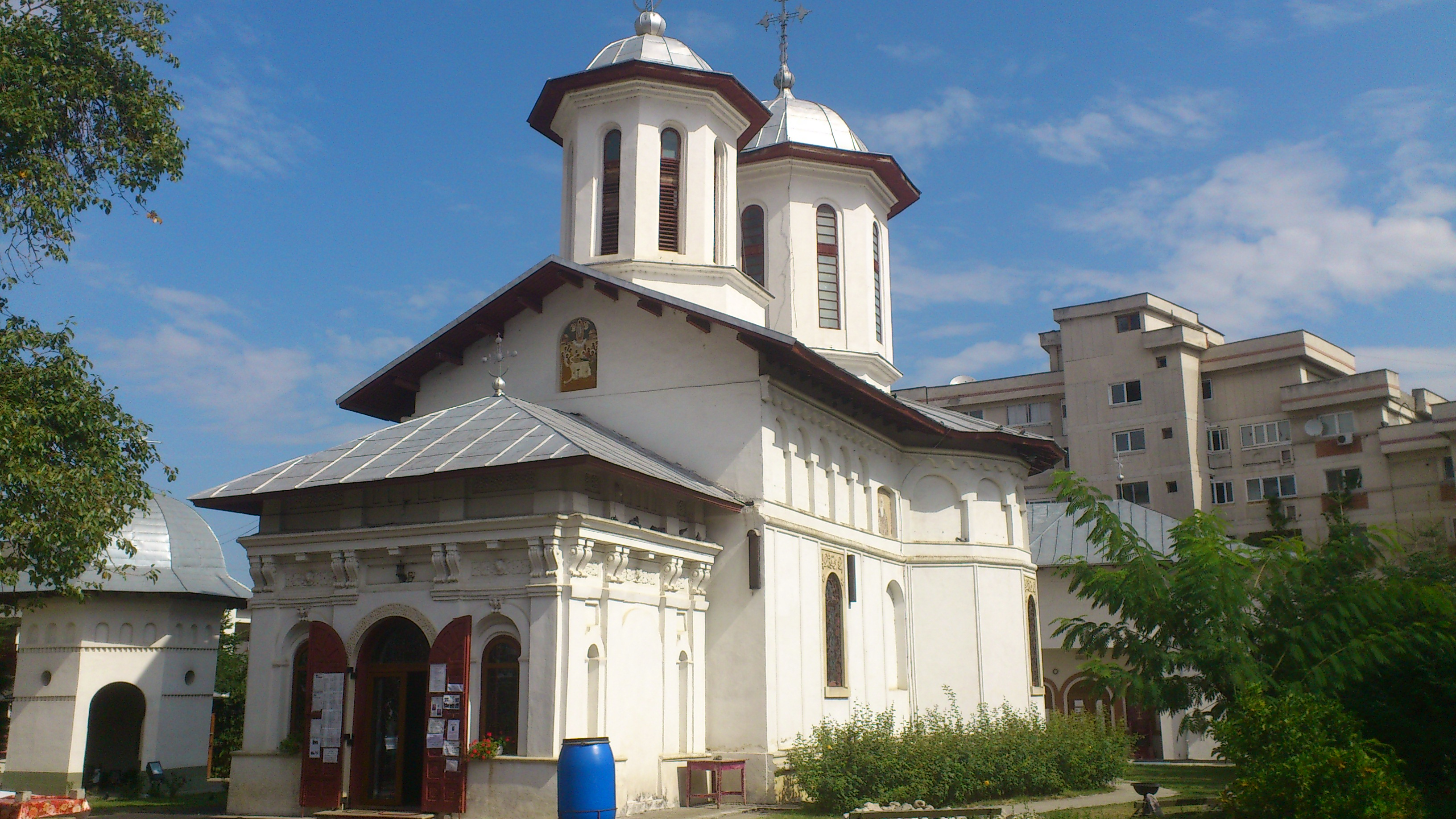 Biserica "Adormirea Maicii Domnului" - Mavrodolu 01